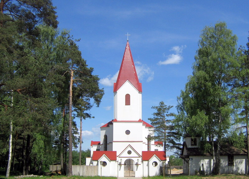 Kościół pw Najświętszego Serca Pana Jezusa w Nowopołocku.